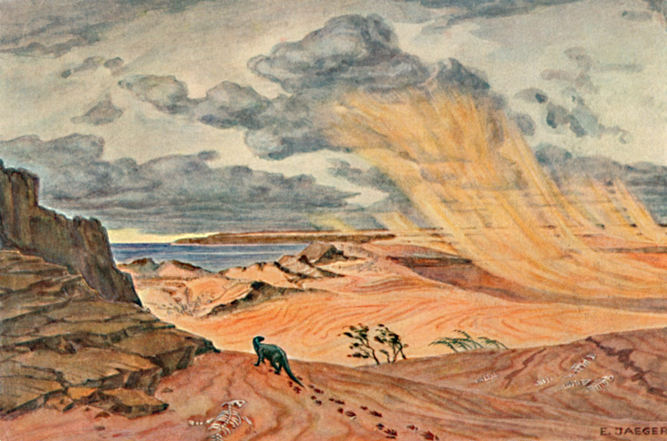 Original title: Wüstenlandschaft der Buntsandsteinzeit (untere Trias), im Hintergrund das zeitweise hereintretende Flachmeer (desert of Buntsandstein, in the background the temporarily transgressing shallow sea)